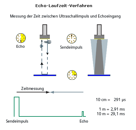 Prinzip Ultrallschall